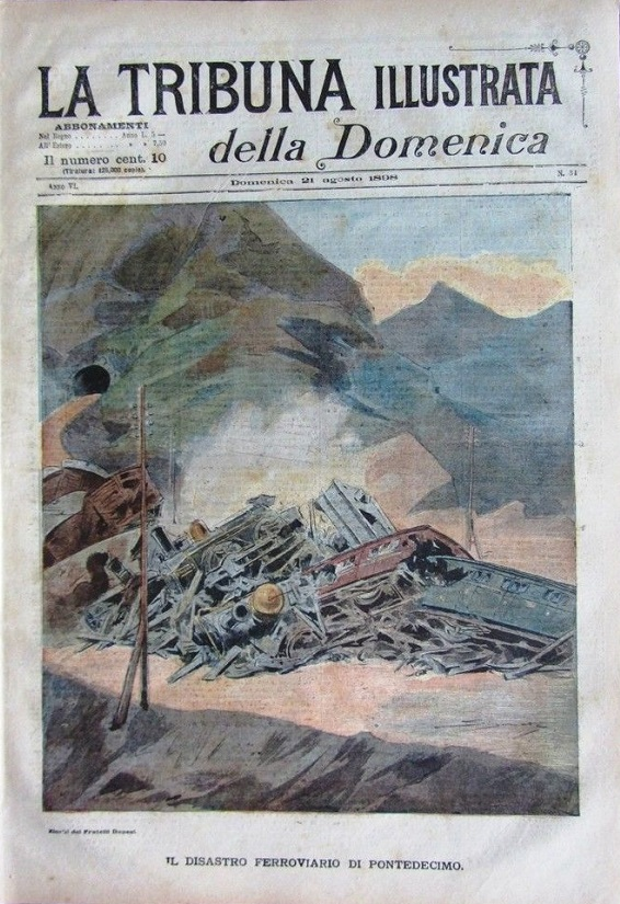 Disastro ferroviario dei Giovi - Serra Riccò (GE) - 11 agosto 1898 sulla Tribuna Illustrata della Domenica del 21 agosto 1898